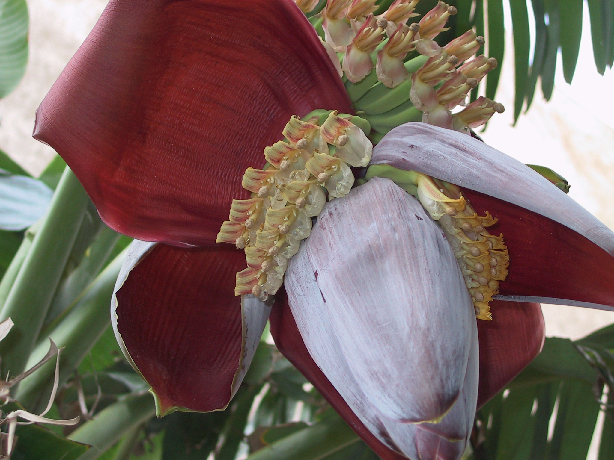 Musa paradisiaca. El nombre de plátano, banana, banano, cambur, topocho o guineo agrupa a un gran número de plantas herbáceas del género Musa, tanto híbridos obtenidos horticulturalmente a partir de las especies silvestres del género Musa acuminata y Musa balbisiana como cultivares genéticamente puros de estas especies. Clasificado originalmente por Linnaeus como Musa paradisiaca en 1753, la especie tipo del género Musa, estudios posteriores han llevado a la conclusión de que la compleja taxonomía del género incluye numerosos híbridos, de variada composición genética, y se ha desarrollado un sistema estrictamente sui generis de clasificación para dar cuenta de esta variación.